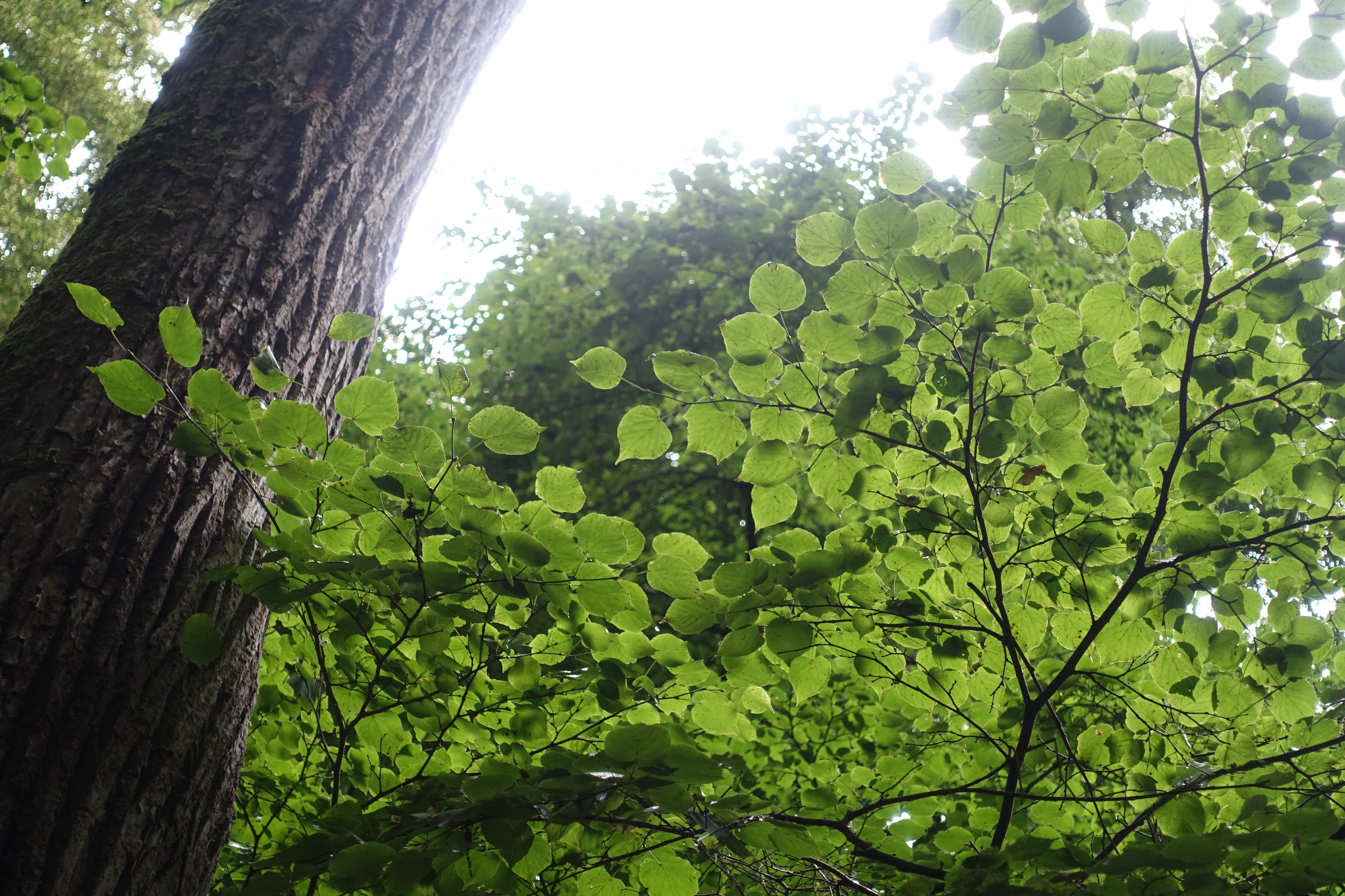 NSG Colbitzer Lindenwald, Waldbild im Südwestteil unweit der beiden Wanderwege